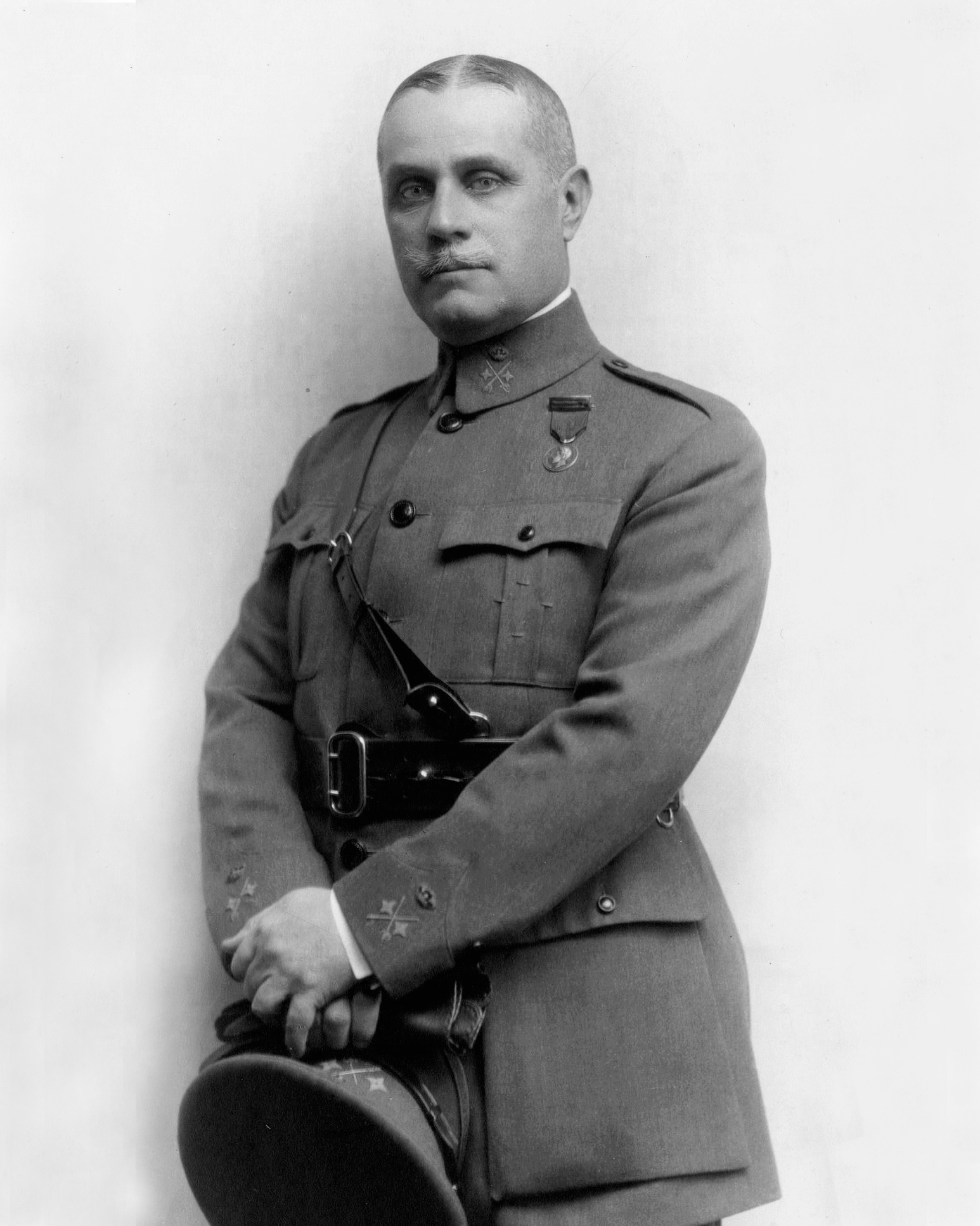 Retrato del militar This is a retouched picture, which means that it has been digitally altered from its original version. Modifications: Adjusting colour..